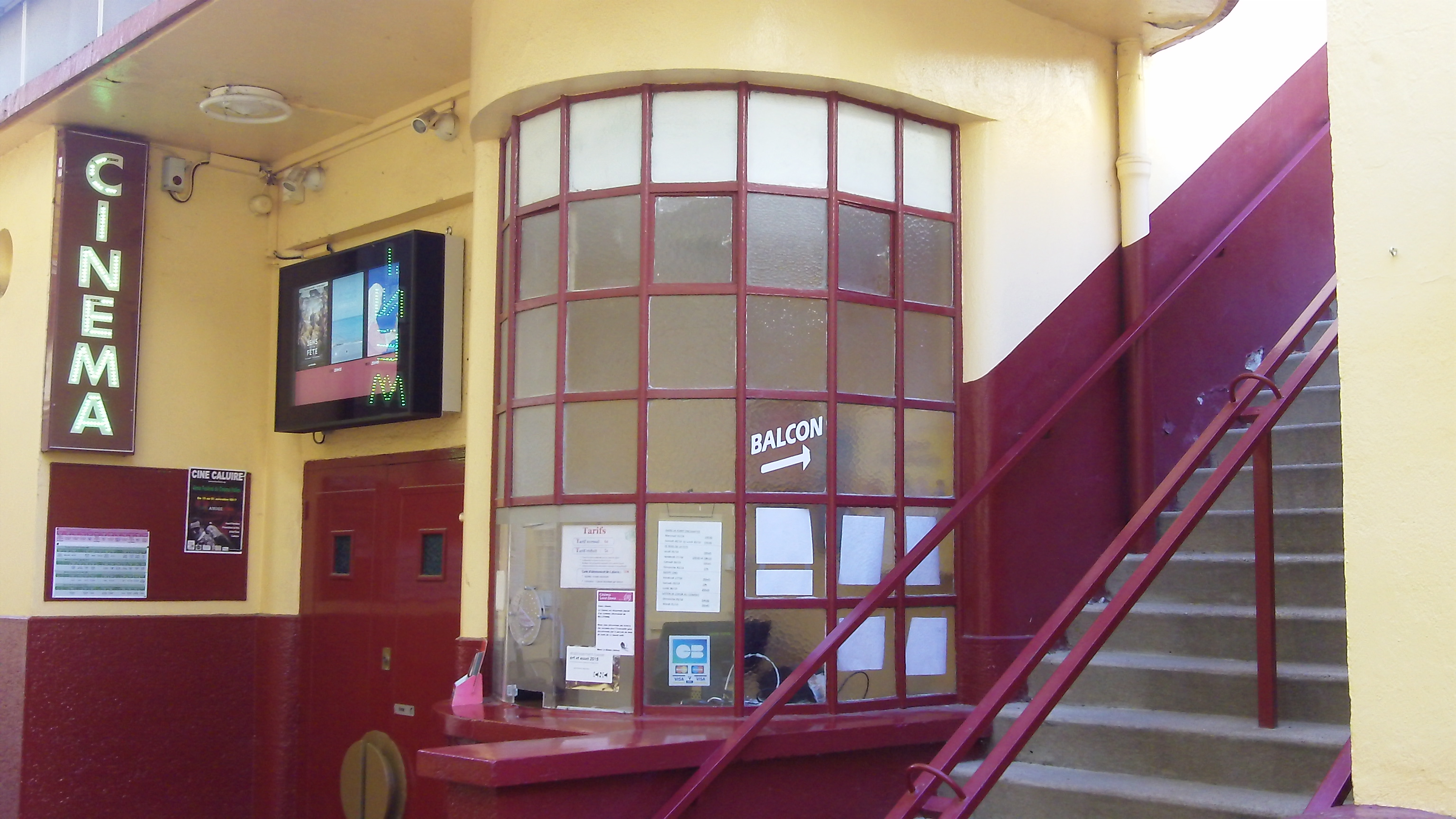 Cinéma Saint Denis Lyon, France